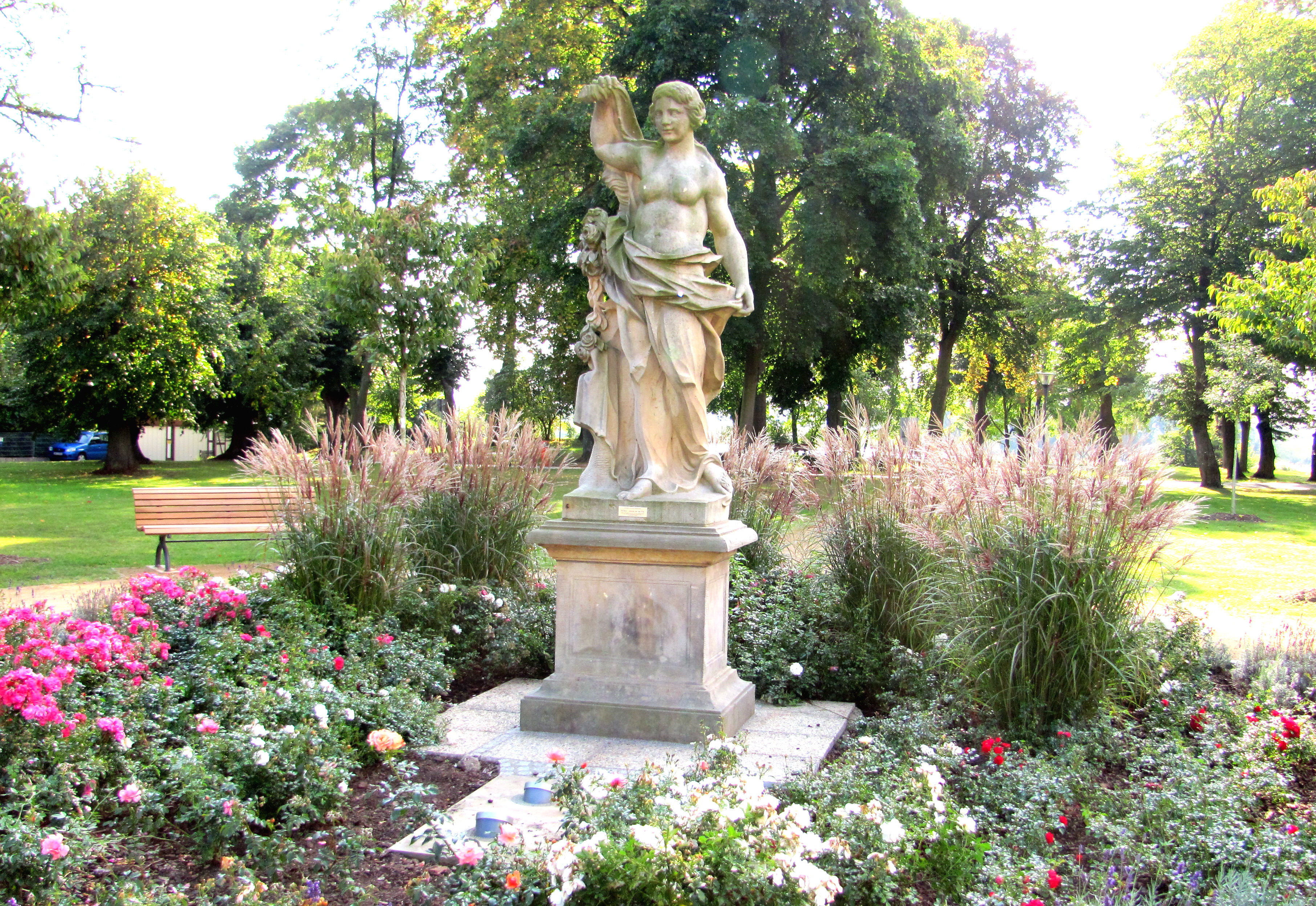 Kopien von sieben Barockskulpturen im Schwedter Schloßgarten Original um 1770 von Carl Philipp Glume Ausf. 1974-1978 durch Bildhauergemeinschaft Elbenaturstein, Dresden Denkmalliste Schwedt, Nr. 17